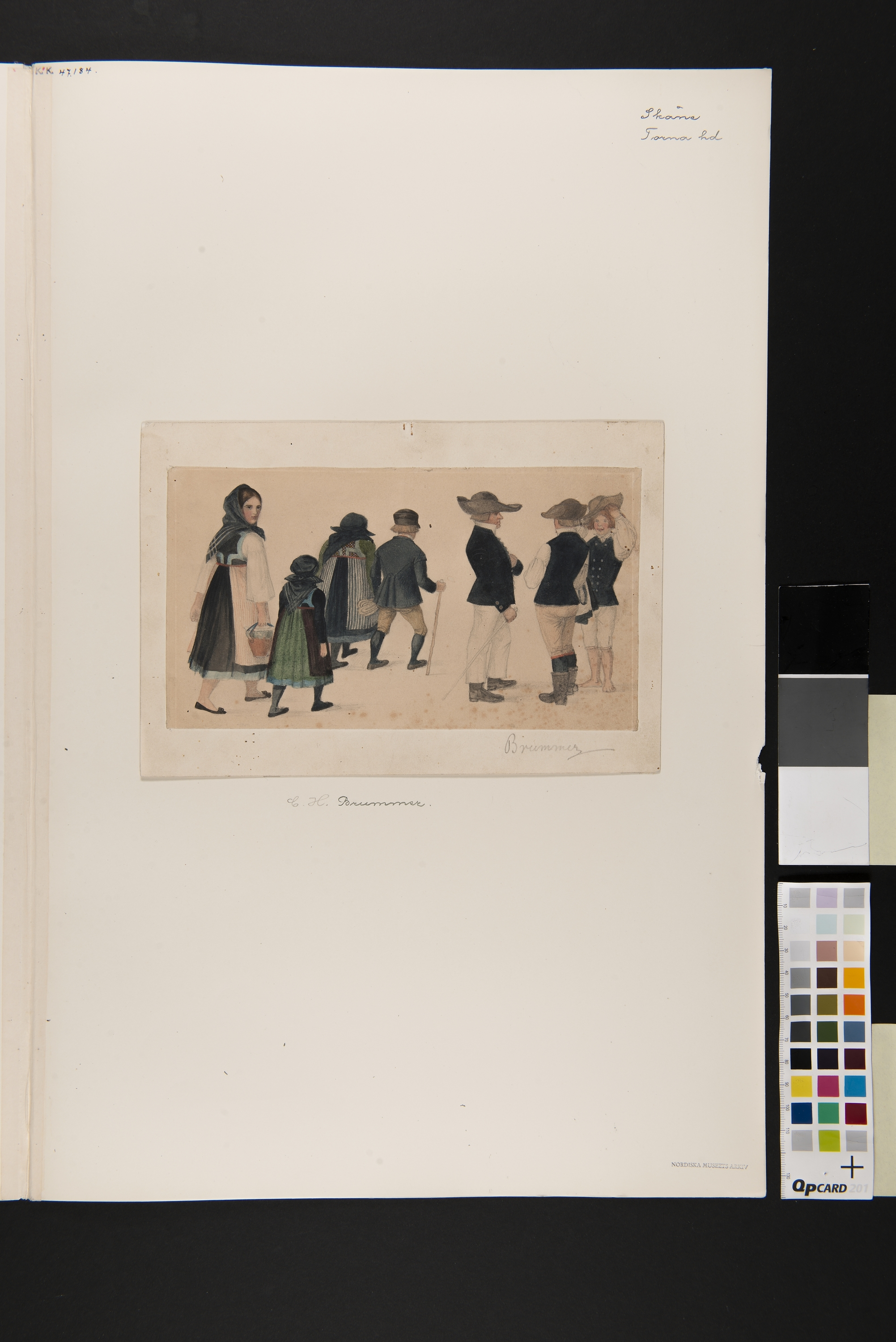 Dräkt. Akvarell. Flera dräktklädda i sällskap, olika kön och ålder. En man är barfota. Akarell av Brummer. Depicted place: Q3591387 (Q3591387) (Härad), Q10466124 (Q10466124)